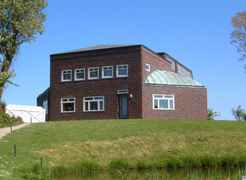 Wohnhaus und Museum von Emil Nolde in Seebüll